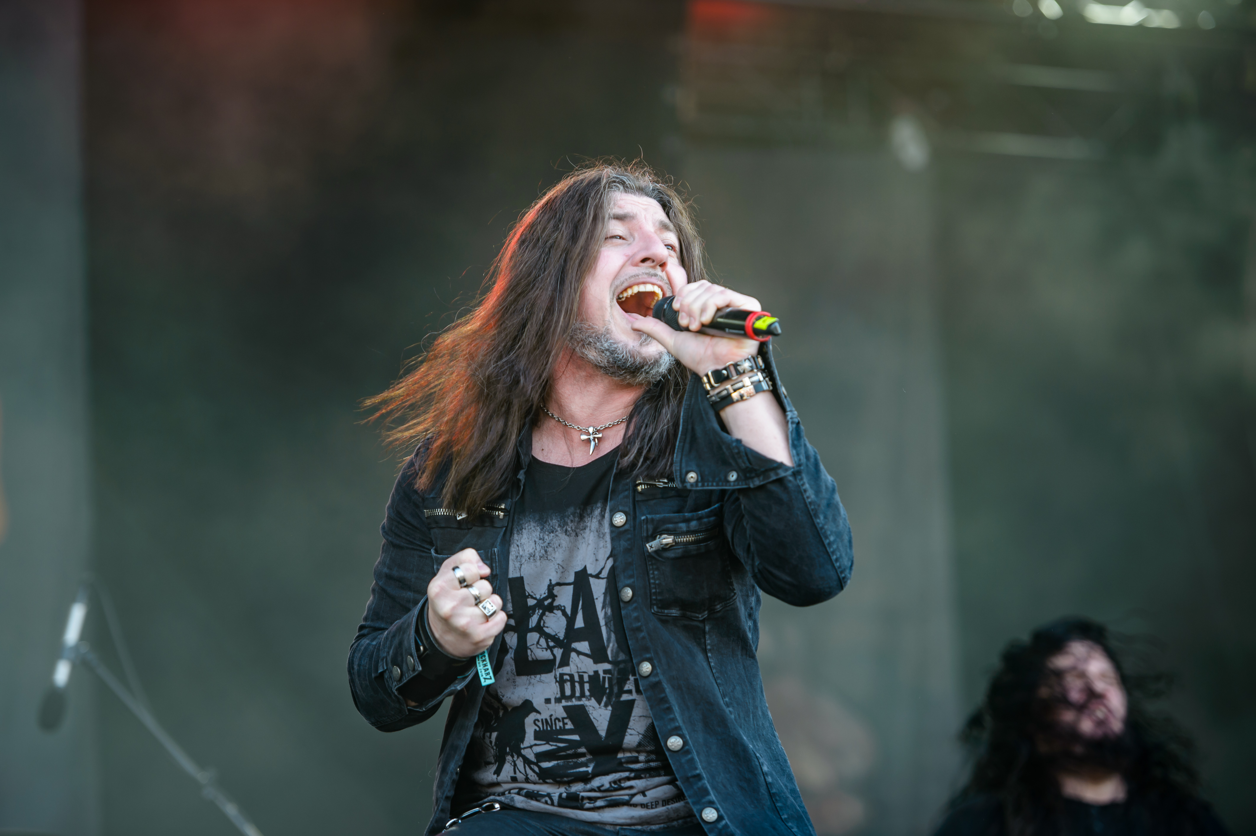 'RockHarz Open Air 2016; Ballenstedt': 'Spiritual Beggars'